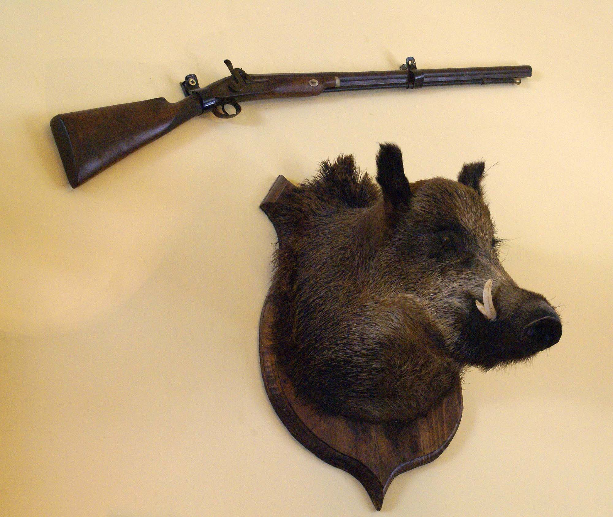 Krobielowice 21 - zamek, XVII, XIX